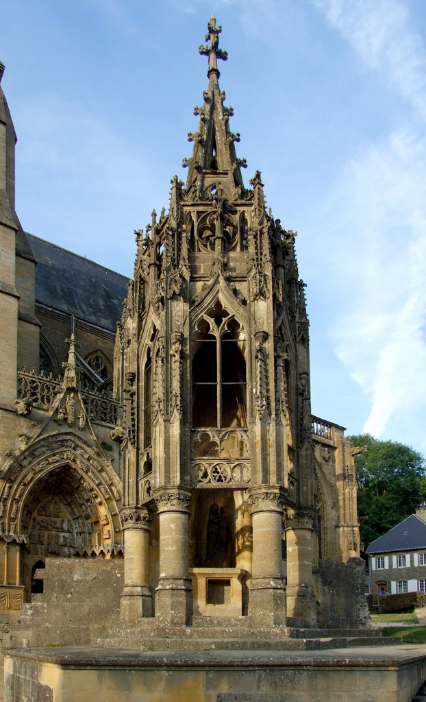 Basilique Notre-Dame d'Avioth